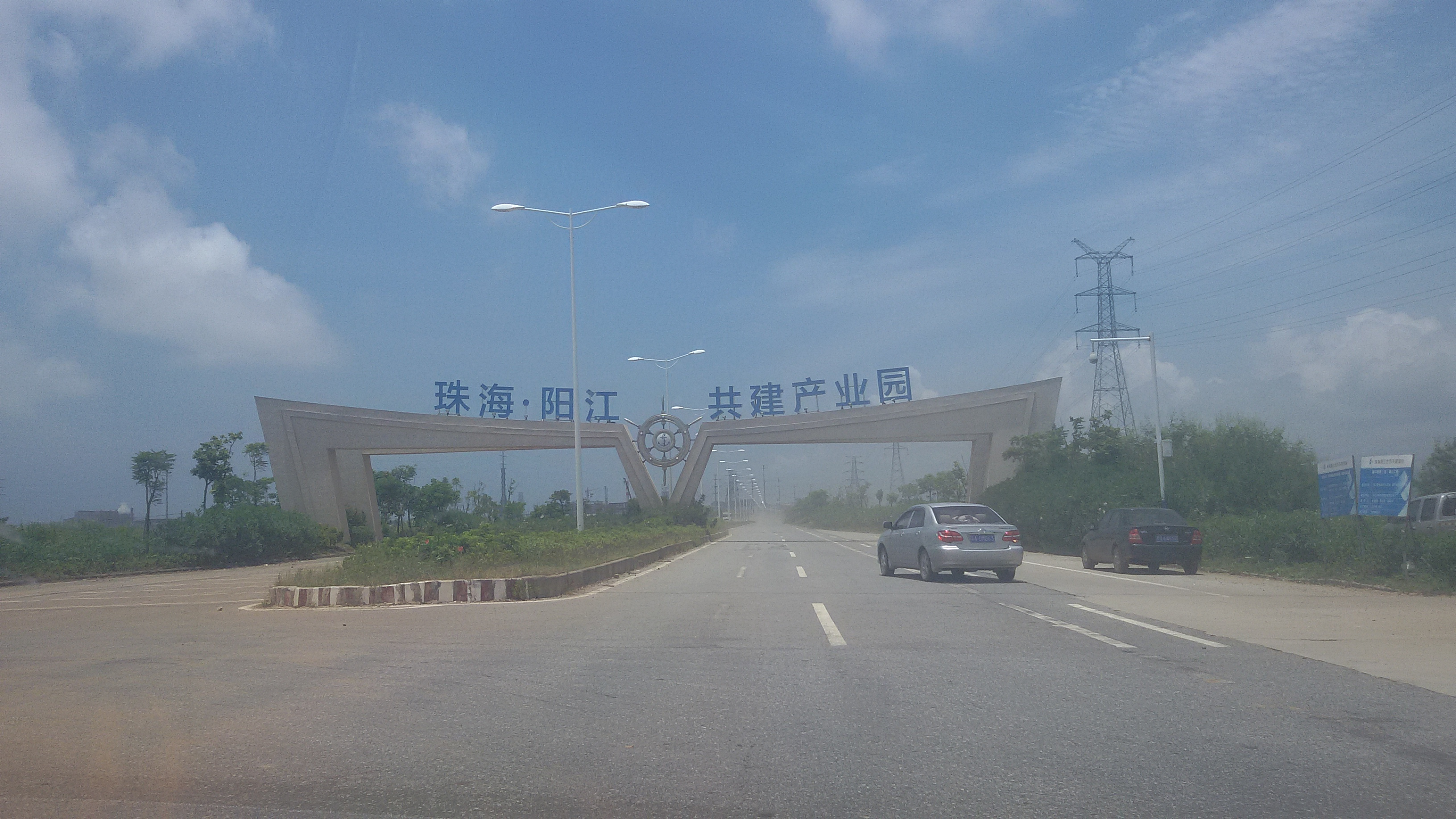 粵語: 珠海阳江合作共建产业园嘅其一大门